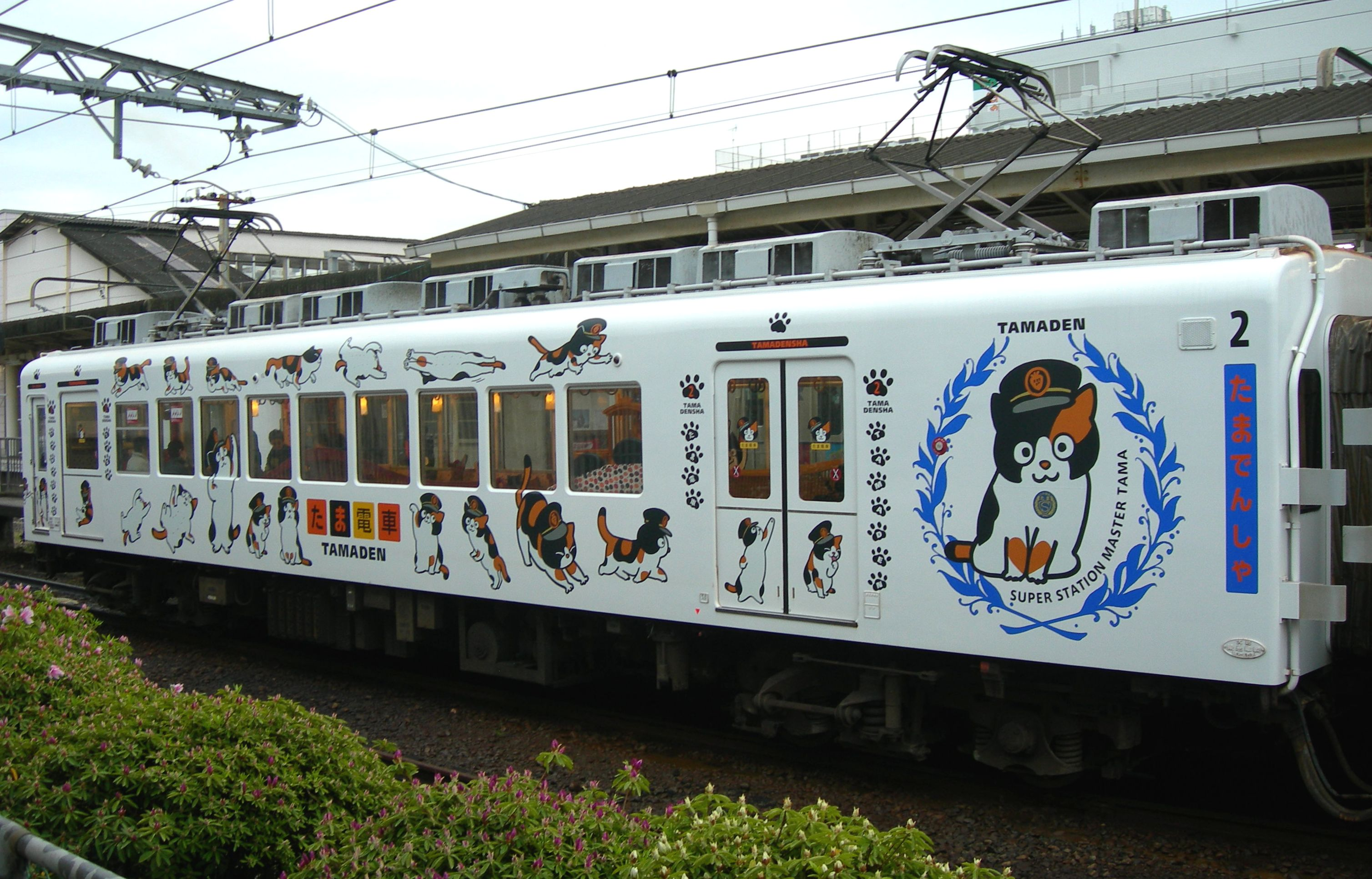 和歌山電鐵たま電車（和歌山駅にて撮影）